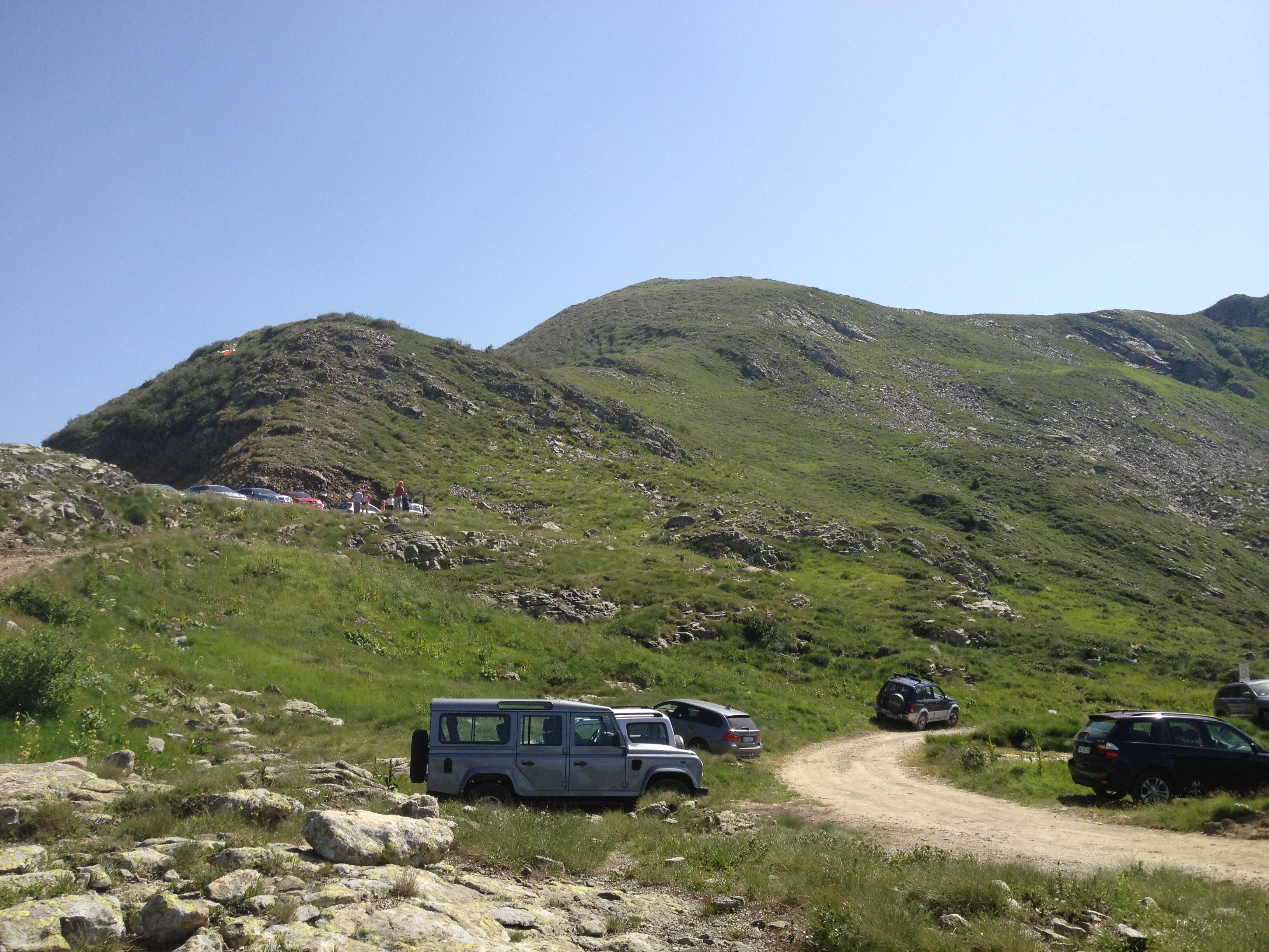 Dasdana visto dal Passo Ravenola